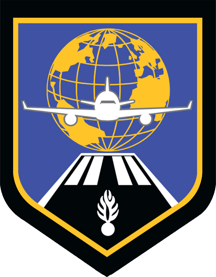 Écusson de la Gendarmerie des Transports Aériens